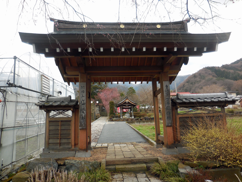 盛隆寺山門